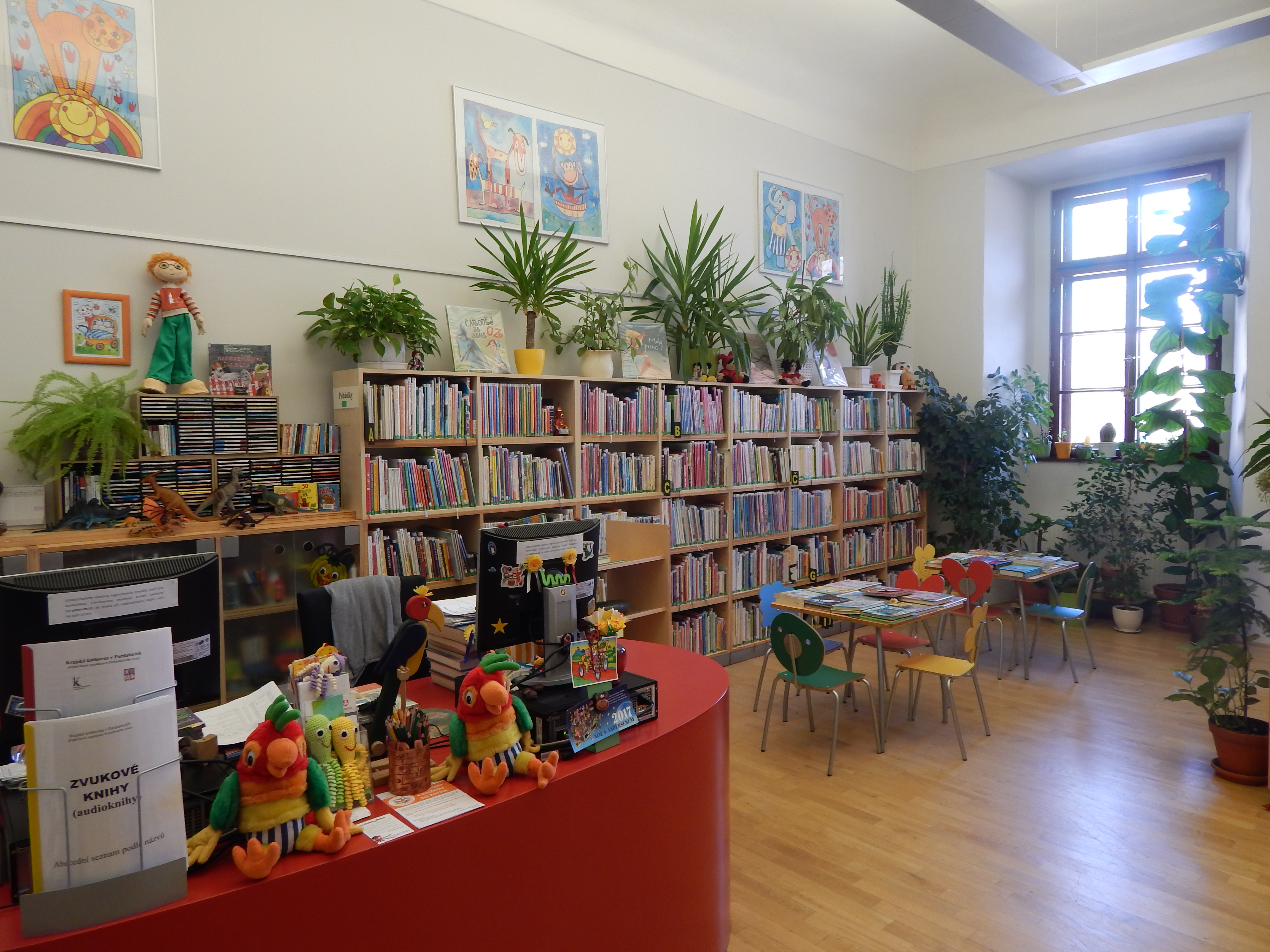 dětské oddělení pro malé čtenáře, prázdniny 2019